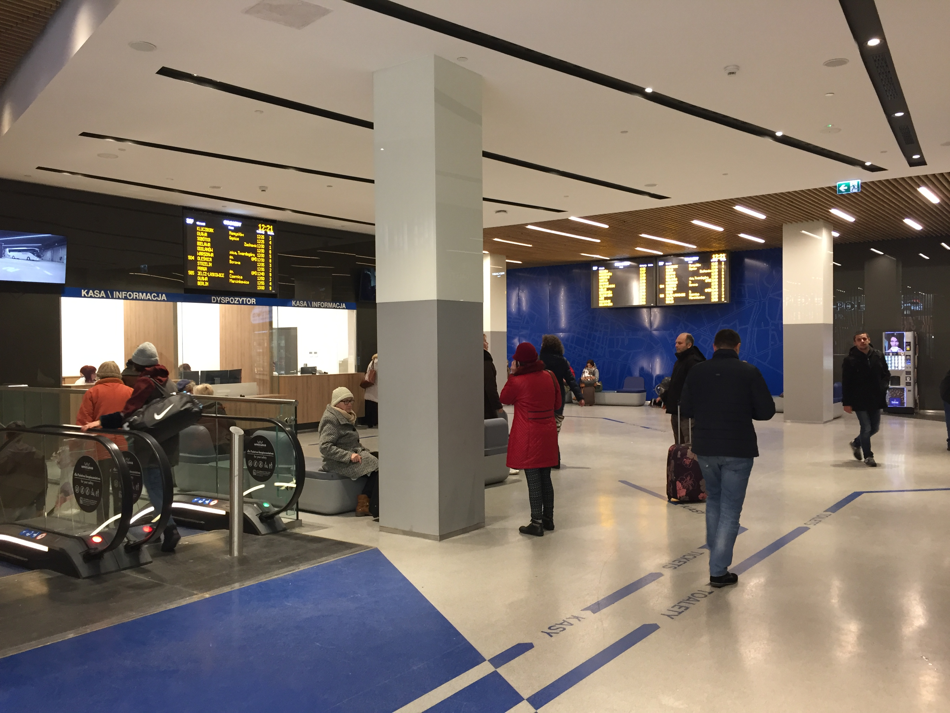 Dworzec Autobusowy we Wroclavii